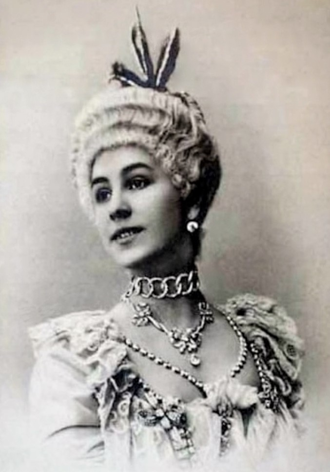 Матильда Кшесинская в балете «Камарго»